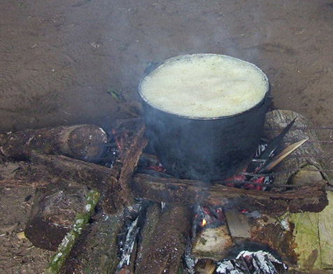 ayahuasca cooking.